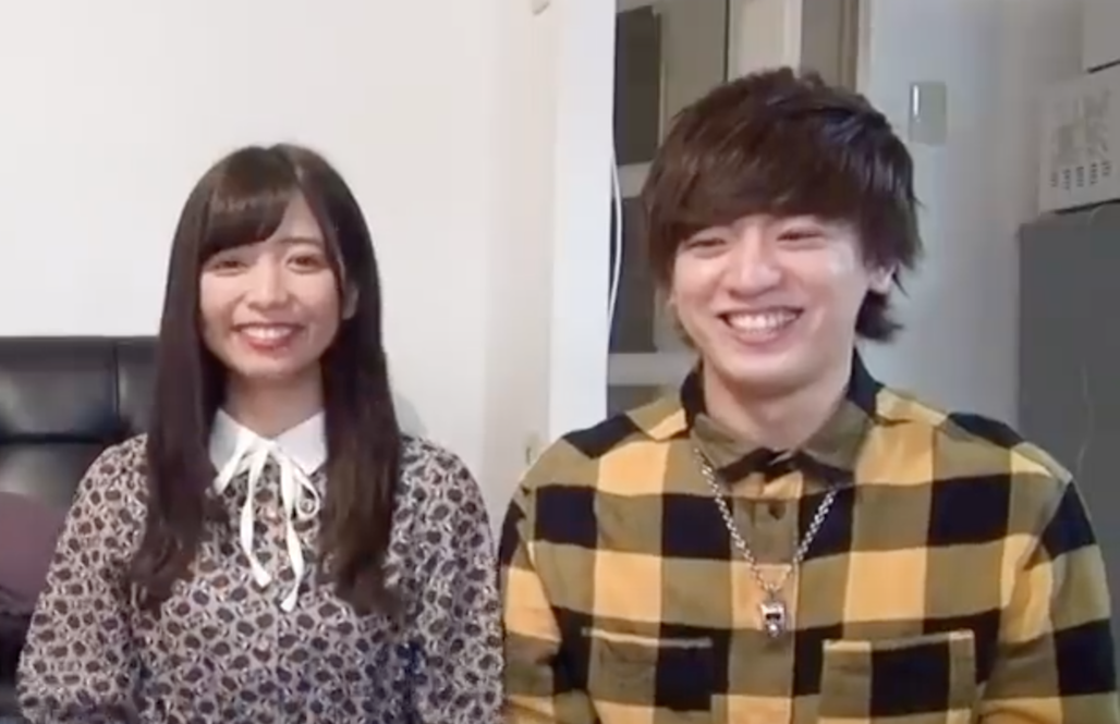 YouTuberのヴァンゆん。原典動画の0:05より。